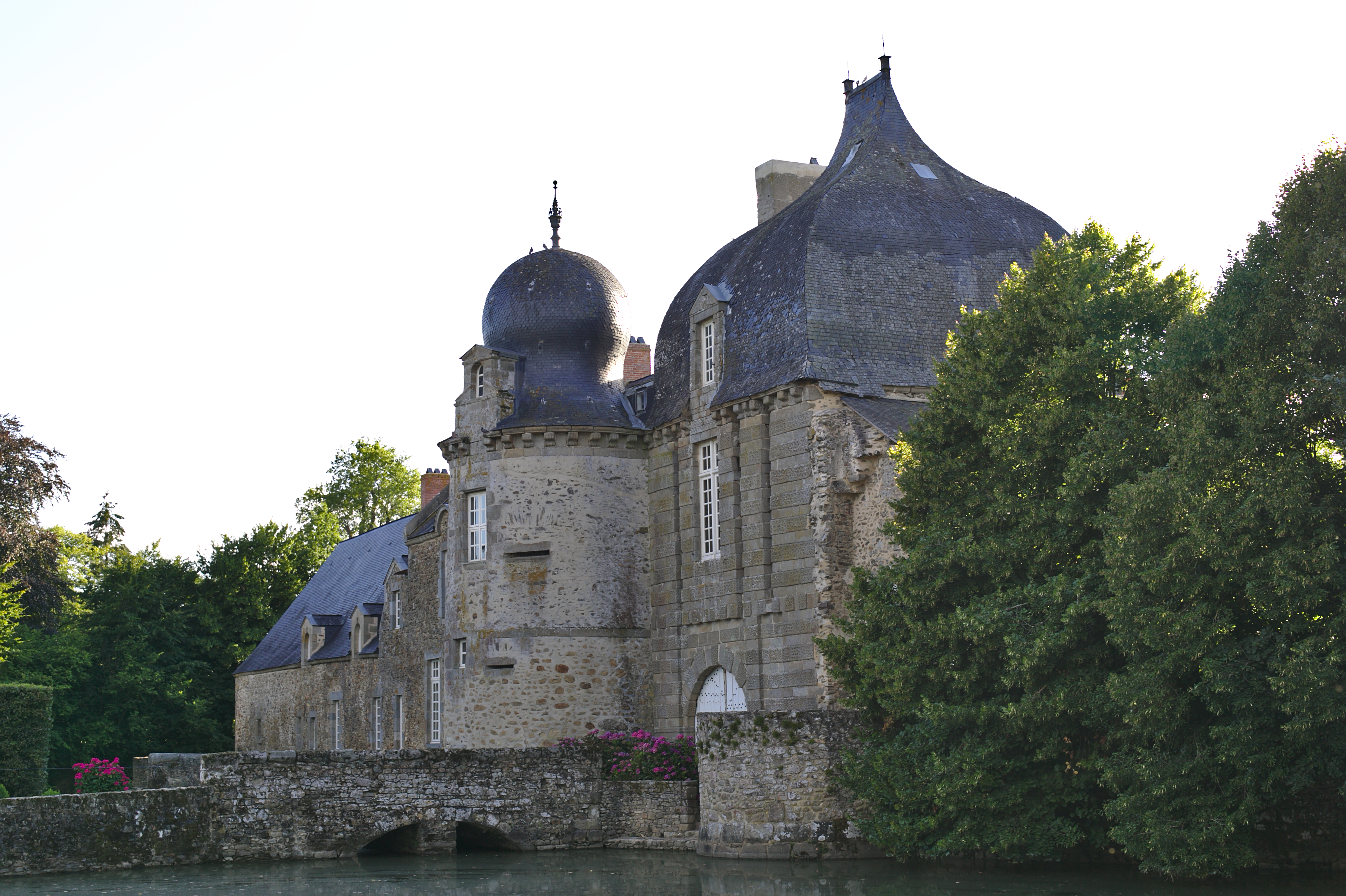 Château de Montesson à Bais (Mayenne). .